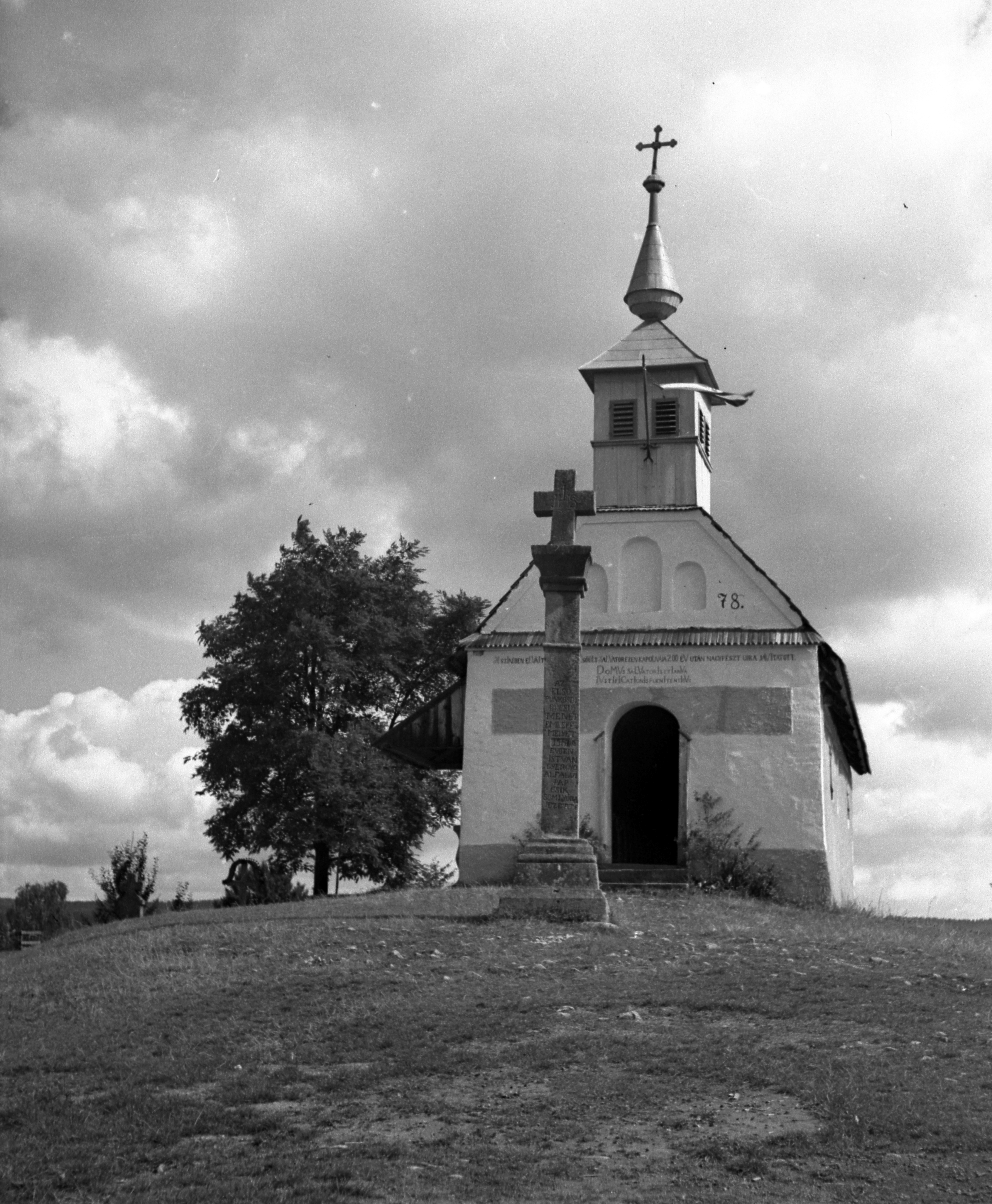 ERDÉLY, Csíksomlyó, Salvator-kápolna 1941-ben.